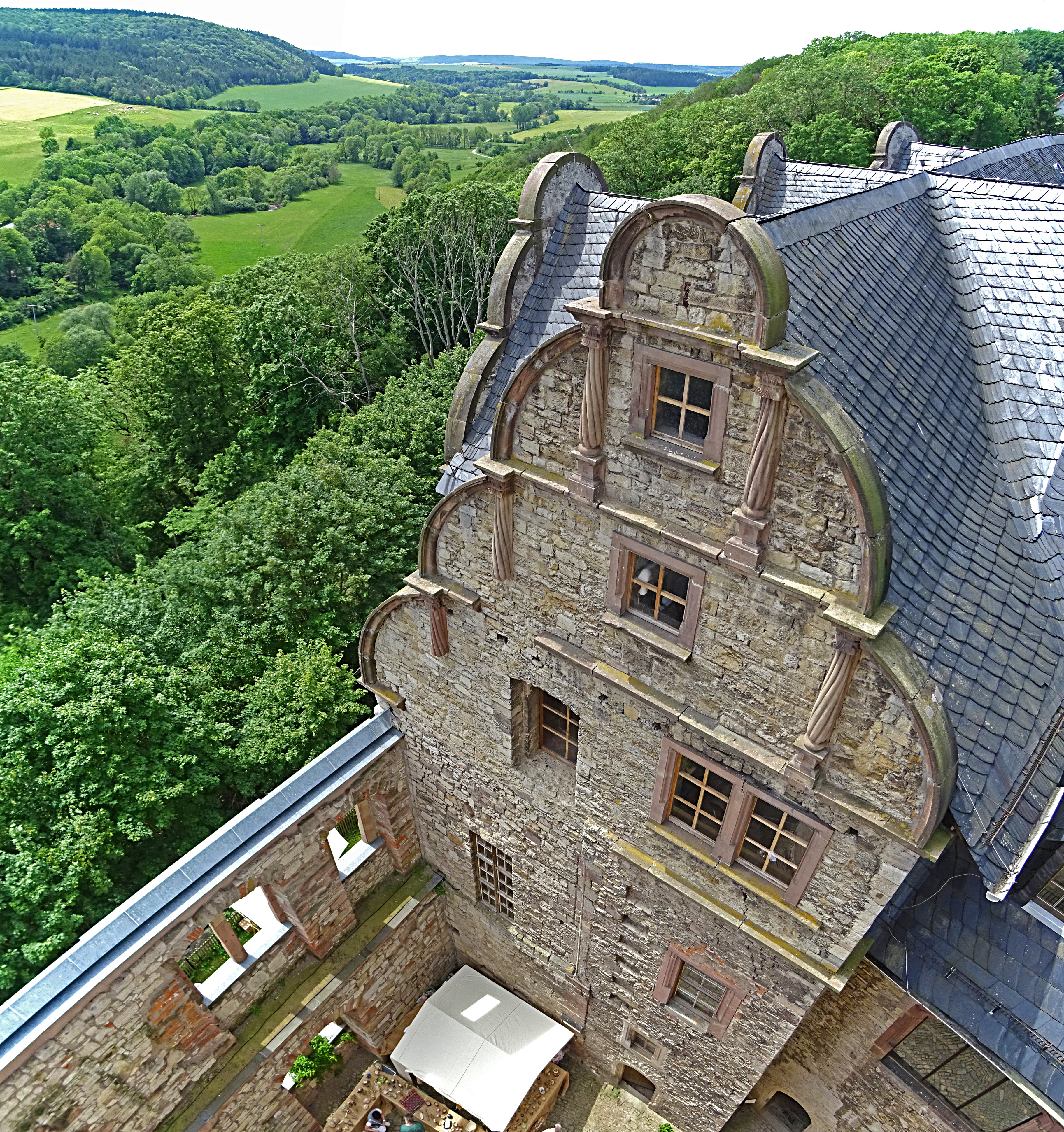 Oberschloss Kranichfeld, Blick vorbei am Palas ins Ilmtal nach Südwesten